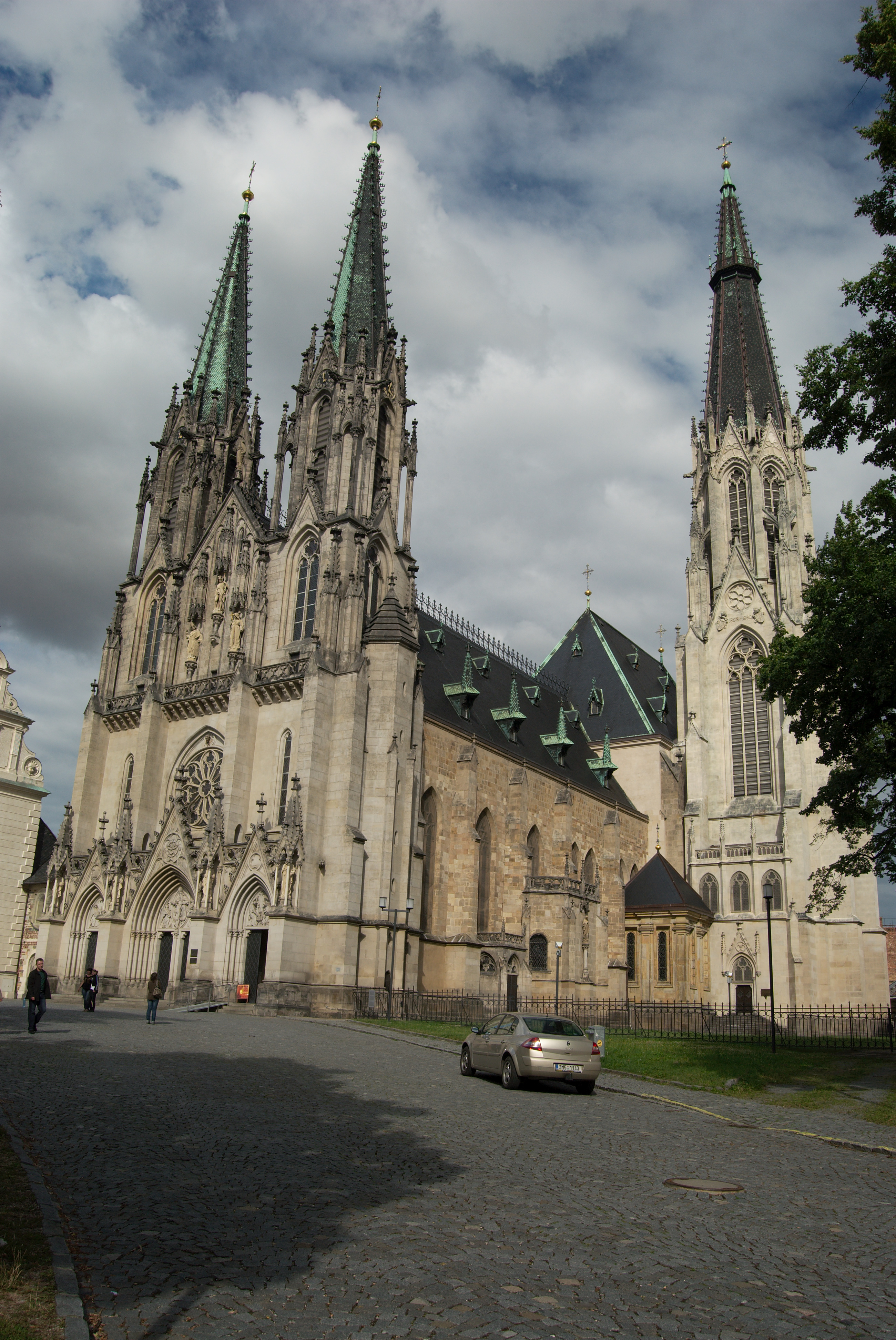 Olomoucká katedrála sv. Václava, vyfotografovaná od jihozápadu